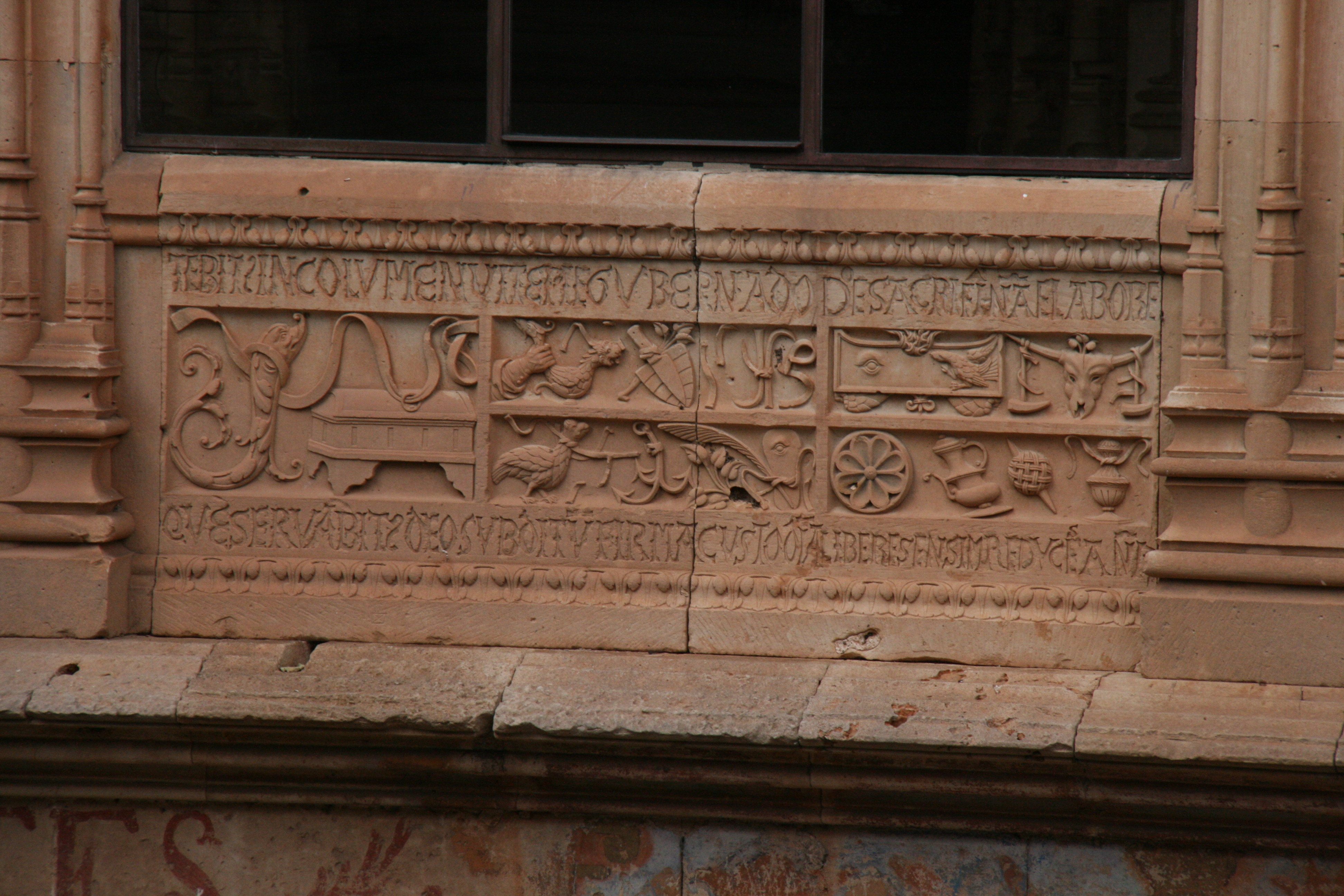 Tercer enigma